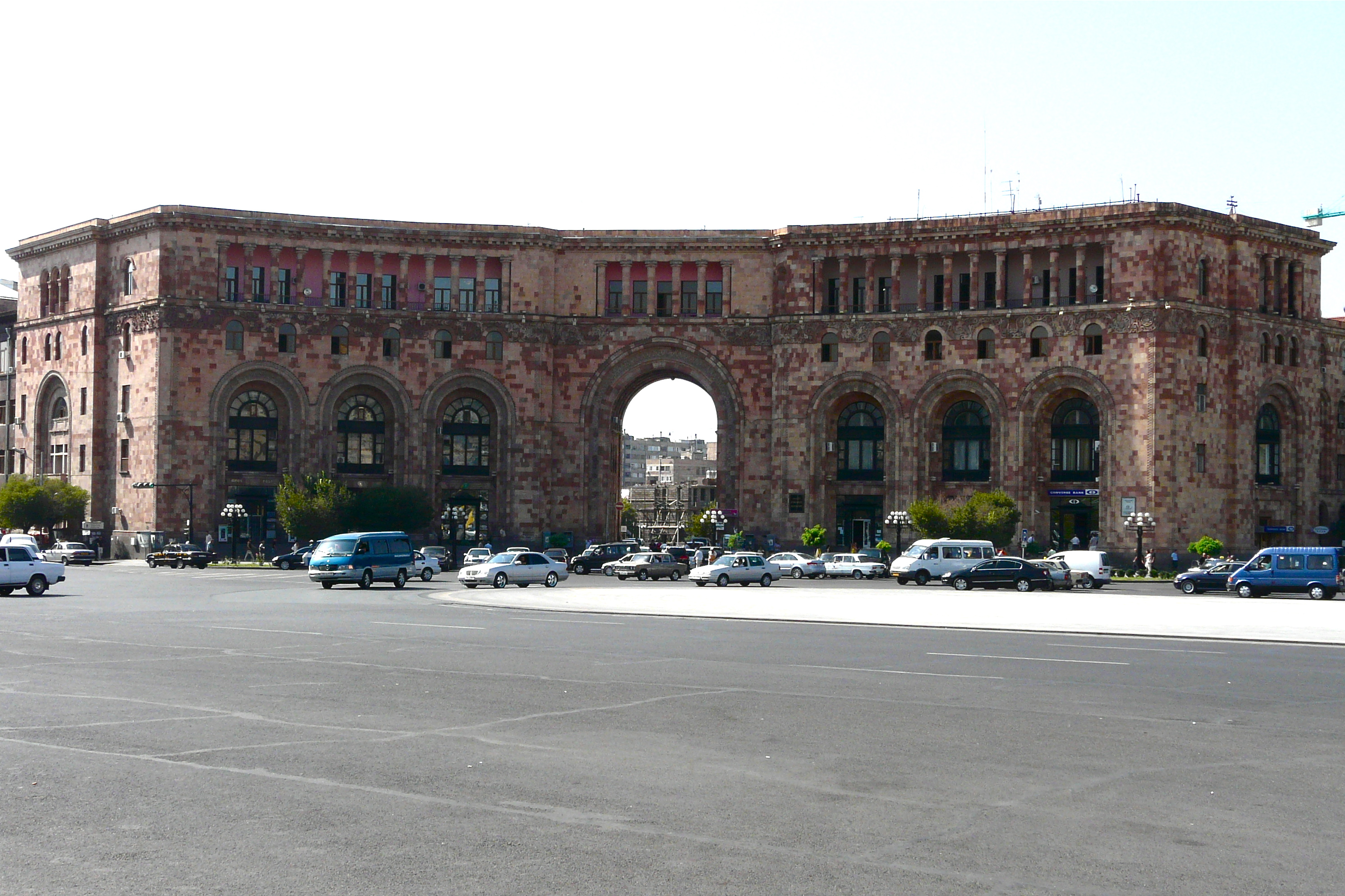 Republic Square Yerevan. zie ook